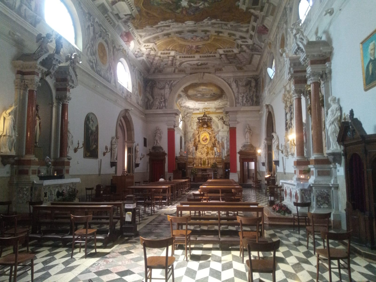 L'interno della chiesa della Beata Vergine del Carmine, ad Udine